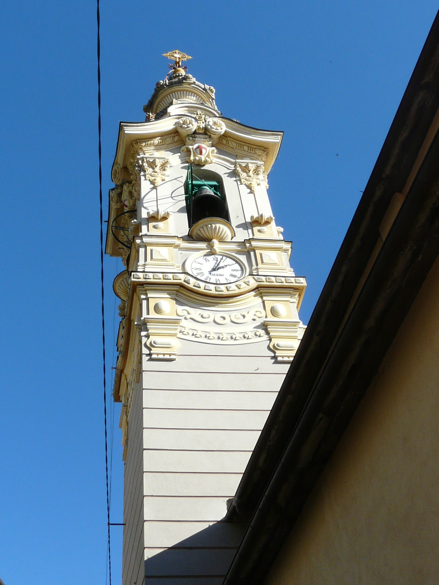 Chiesa di San Rocco, Ognio, Neirone, Liguria, Italia